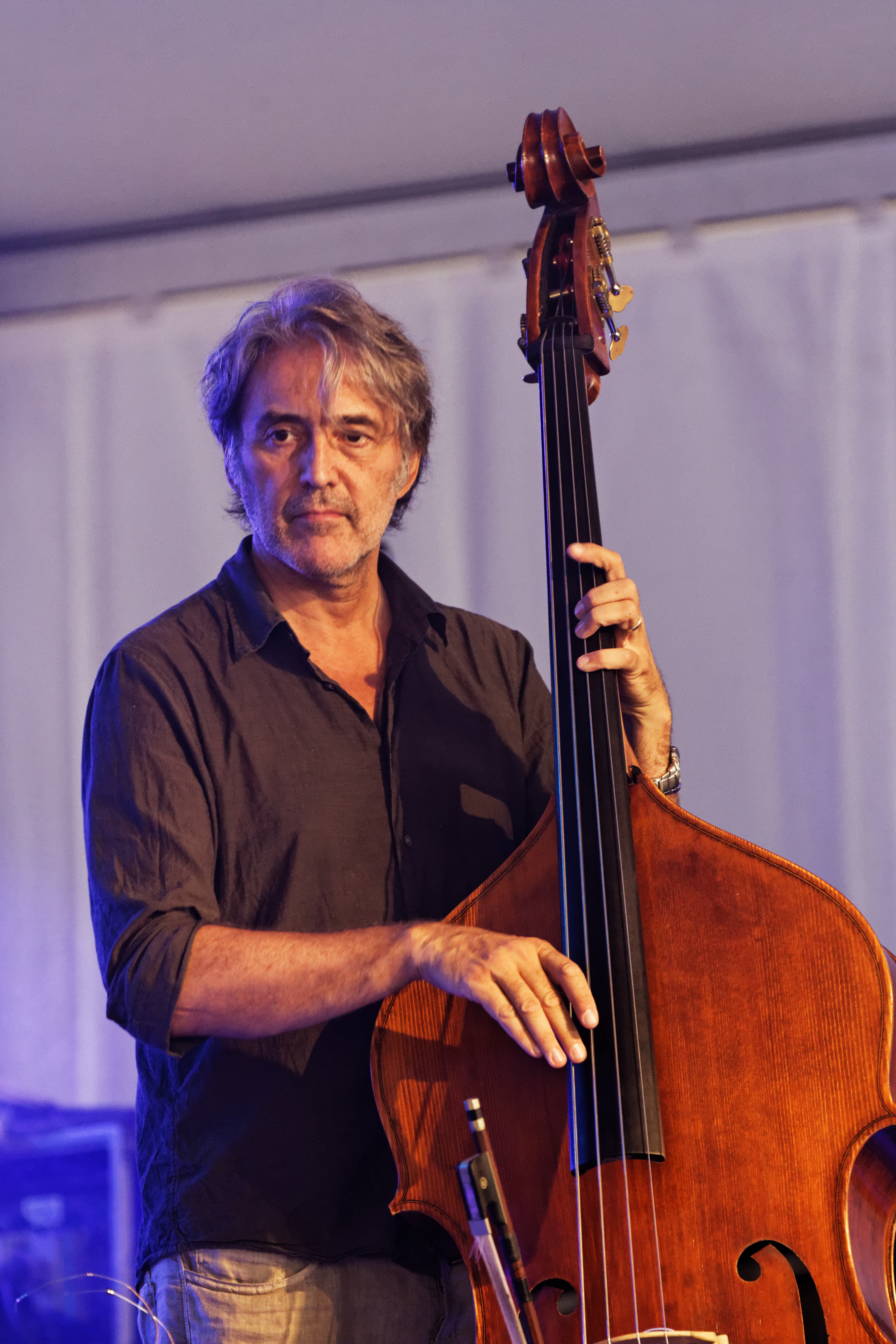 Lúnasa en concert à l'espace évêché lors du festival de Cornouaille 2013.